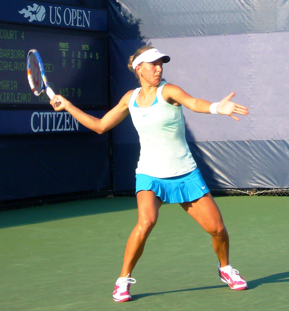 Barbora Záhlavová-Strýcová